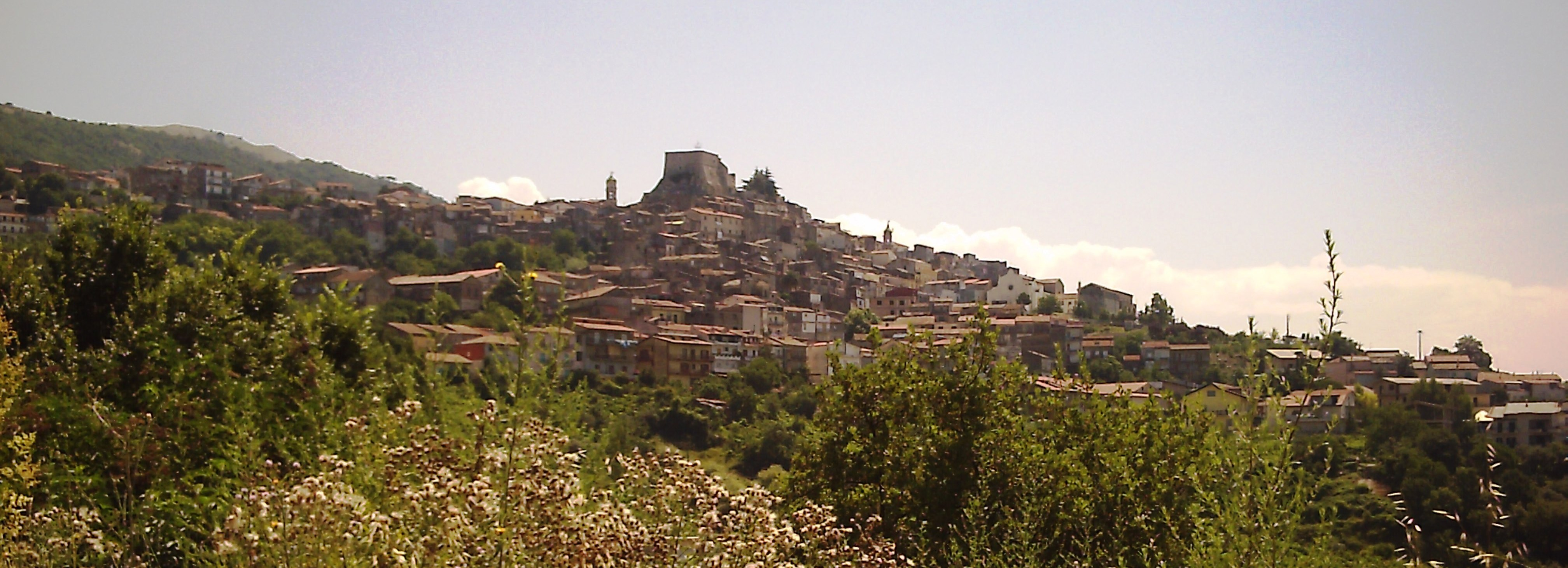 Panorama di Guardia Sanframondi (Bn)